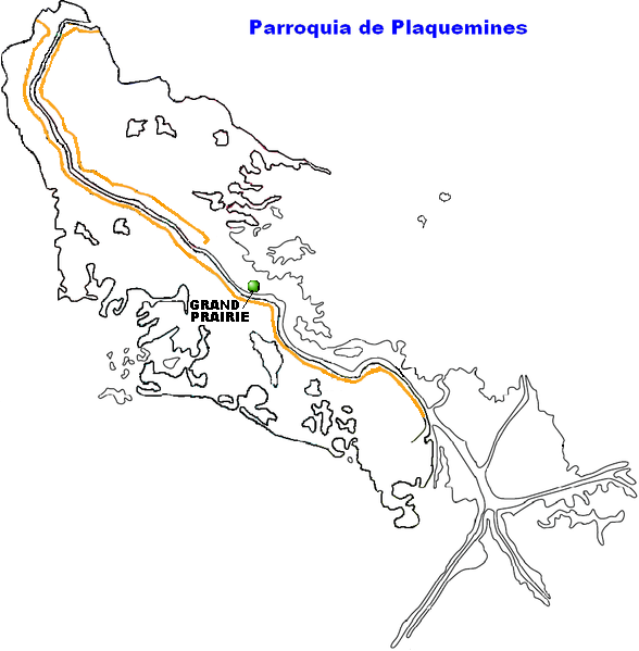 Grand Prairie, Louisiana